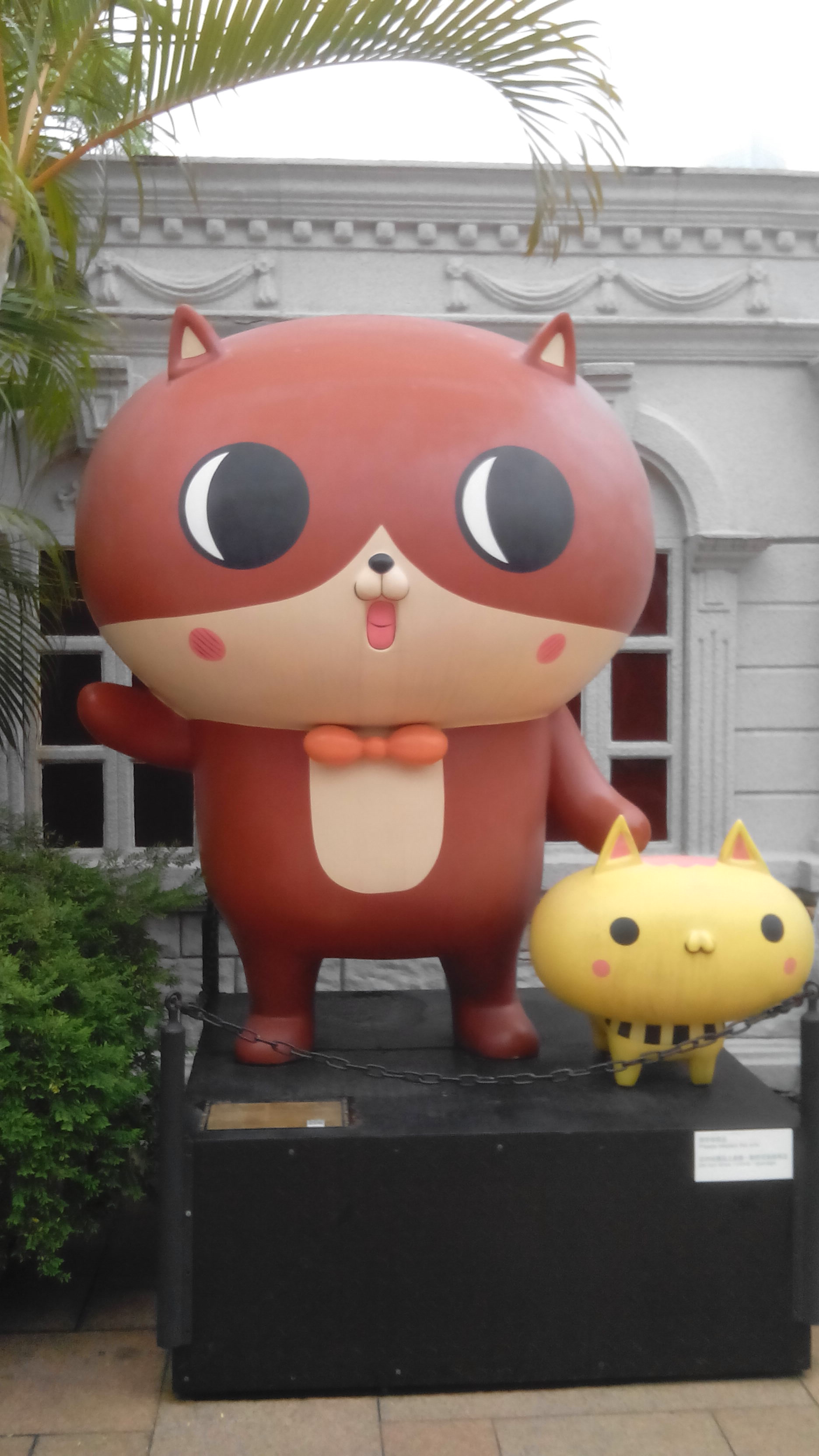 《癲噹》主角-癲噹